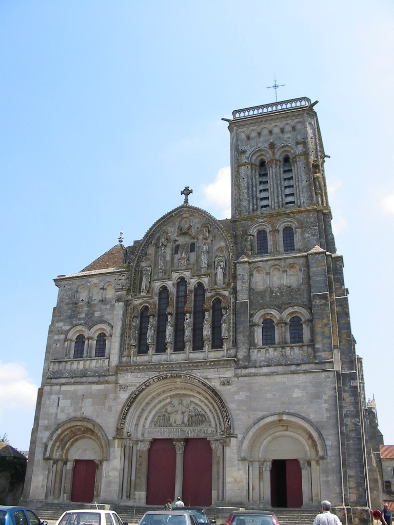 Facade de la basilique Sainte-Marie-Madeleine de Vézelay, Yonne, France